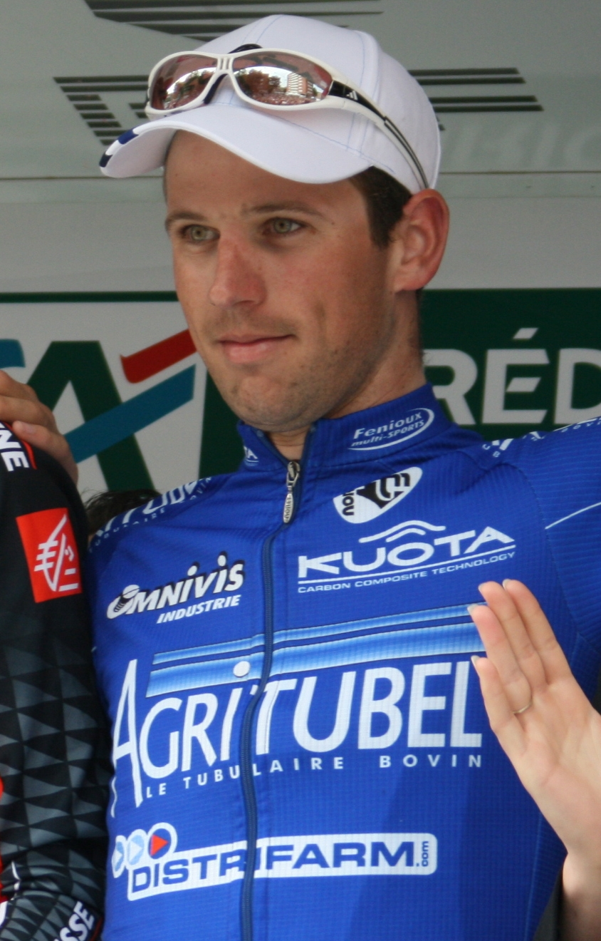 David Lelay, lors des Quatre jours de Dunkerque 2009